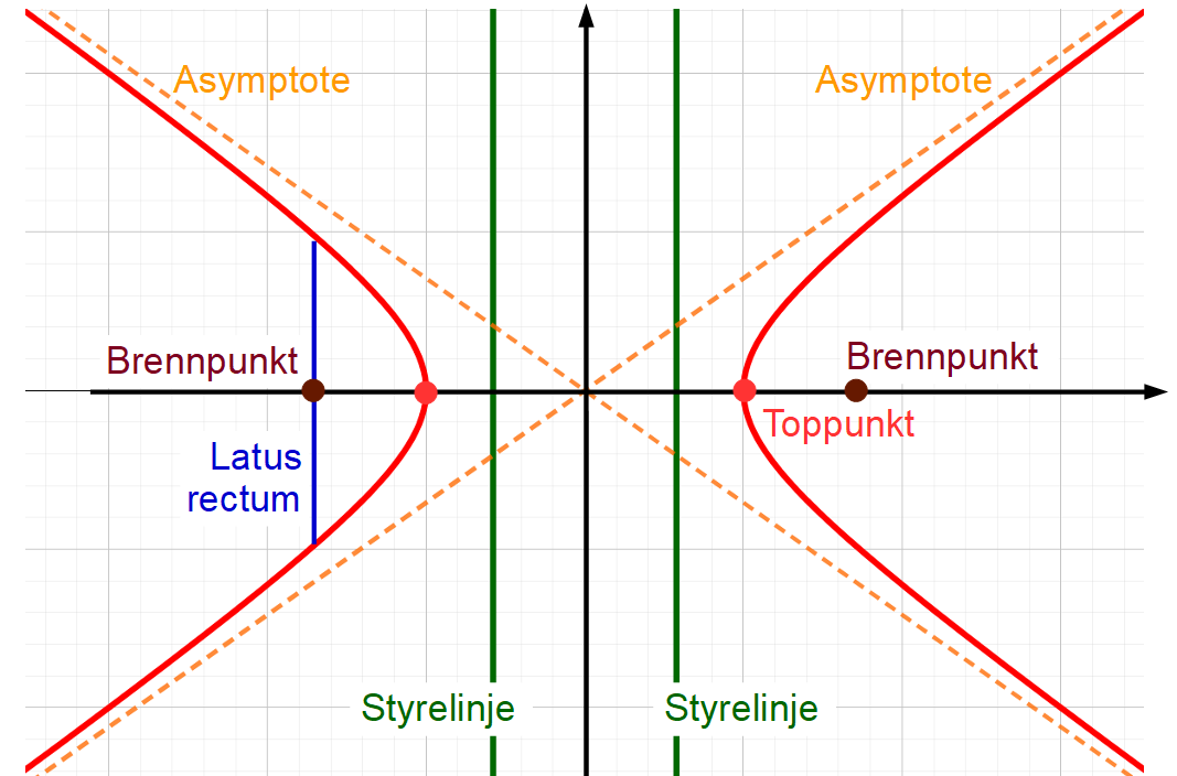 Terminology for an hyperbola. Norwegian